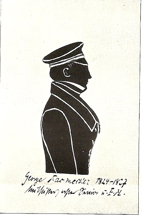 Zeitgenössisches Porträt (Scherenschnitt) des sp. hannoverschen Ministers Georg Bacmeister (1807-1890) als Göttinger Student des Corps Hannovera Göttingen mit Couleur